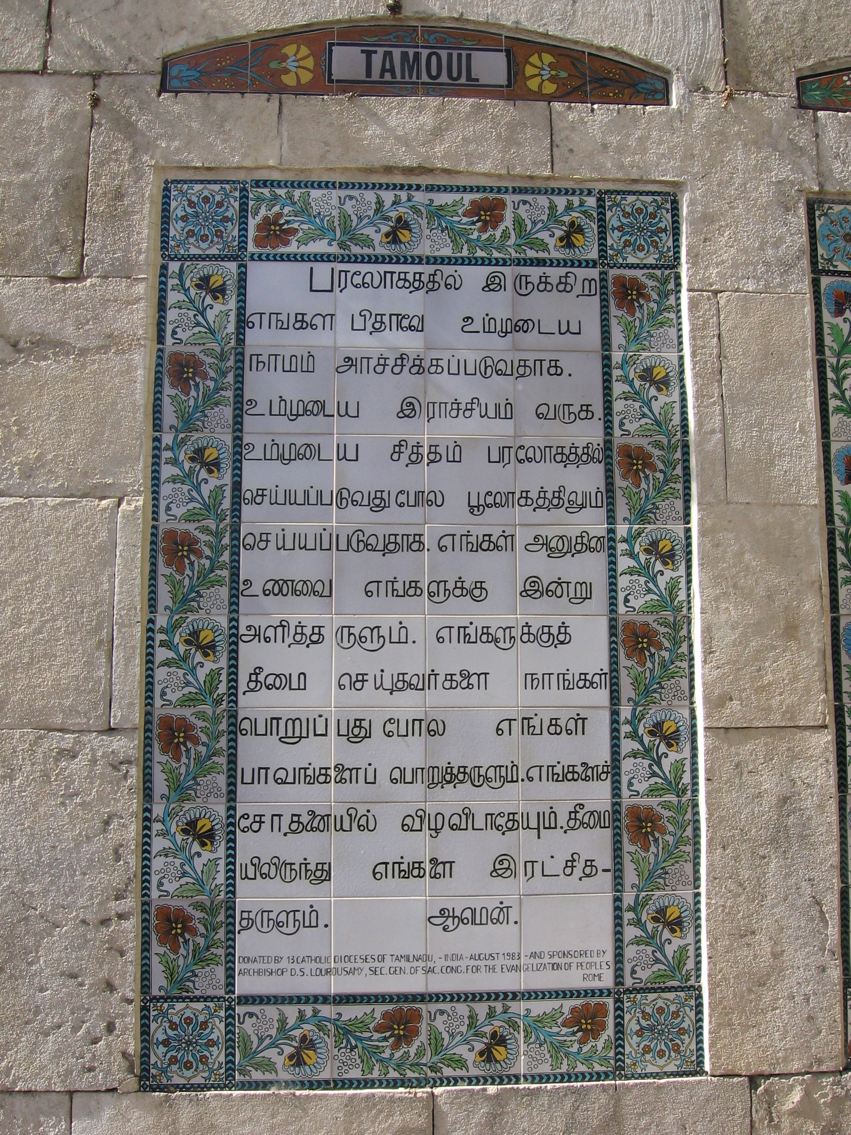 Chiesa del Padre Nostro, a Gerusalemme. Preghiera in tamoul